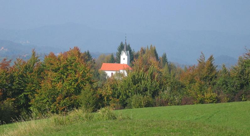 Cerkev sv. Lamberta na Pristavi nad Stično